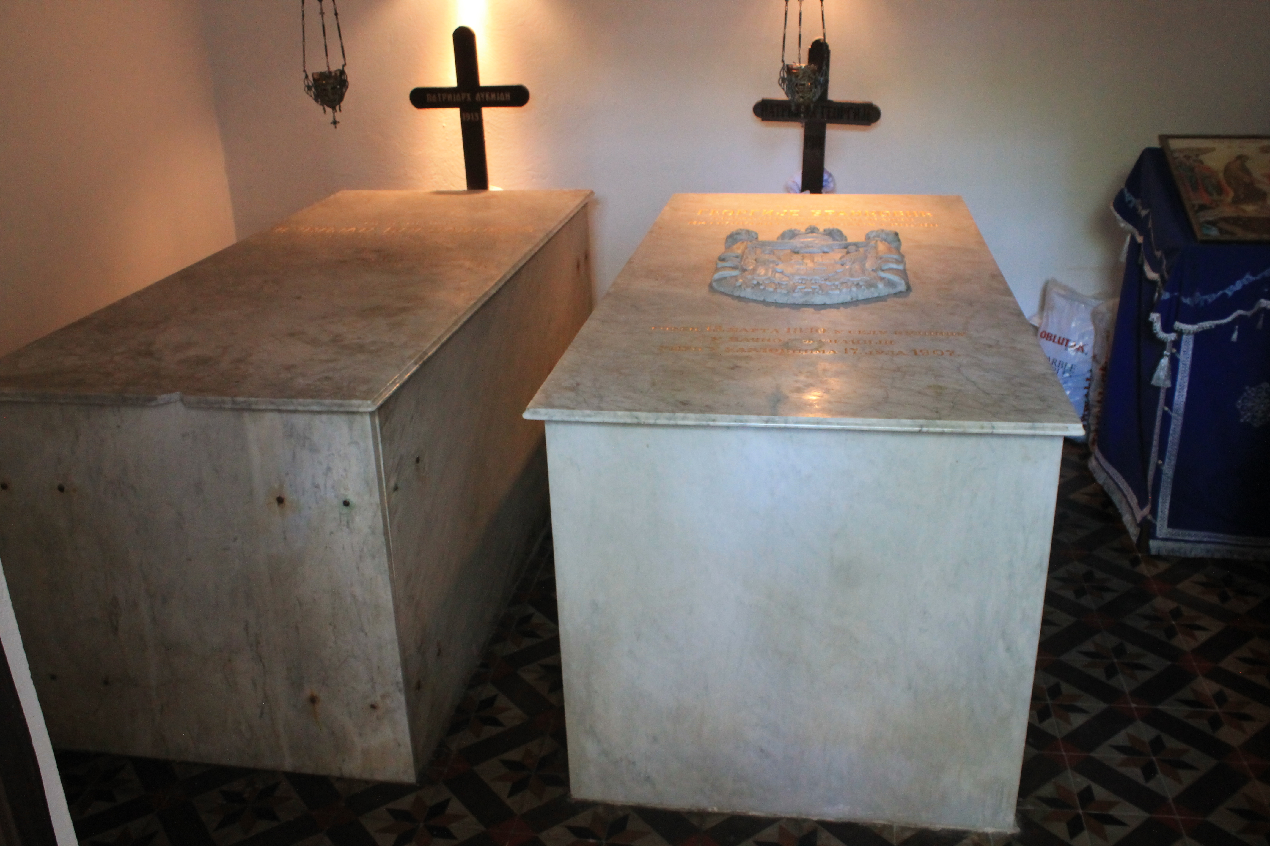 Манастир Ваведења Пресвете Богородице, Сремски Карловци